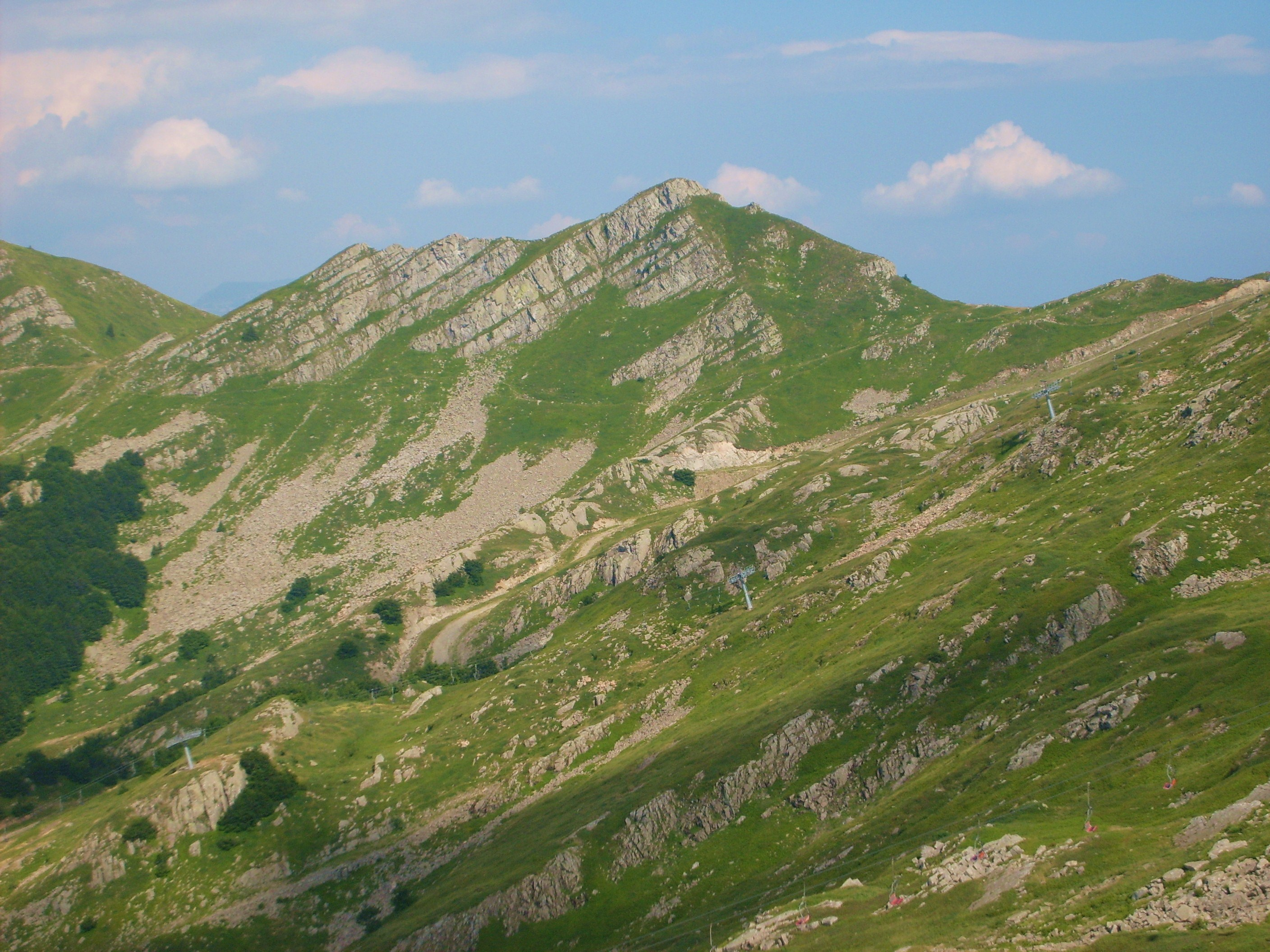 Foto scattata da me.